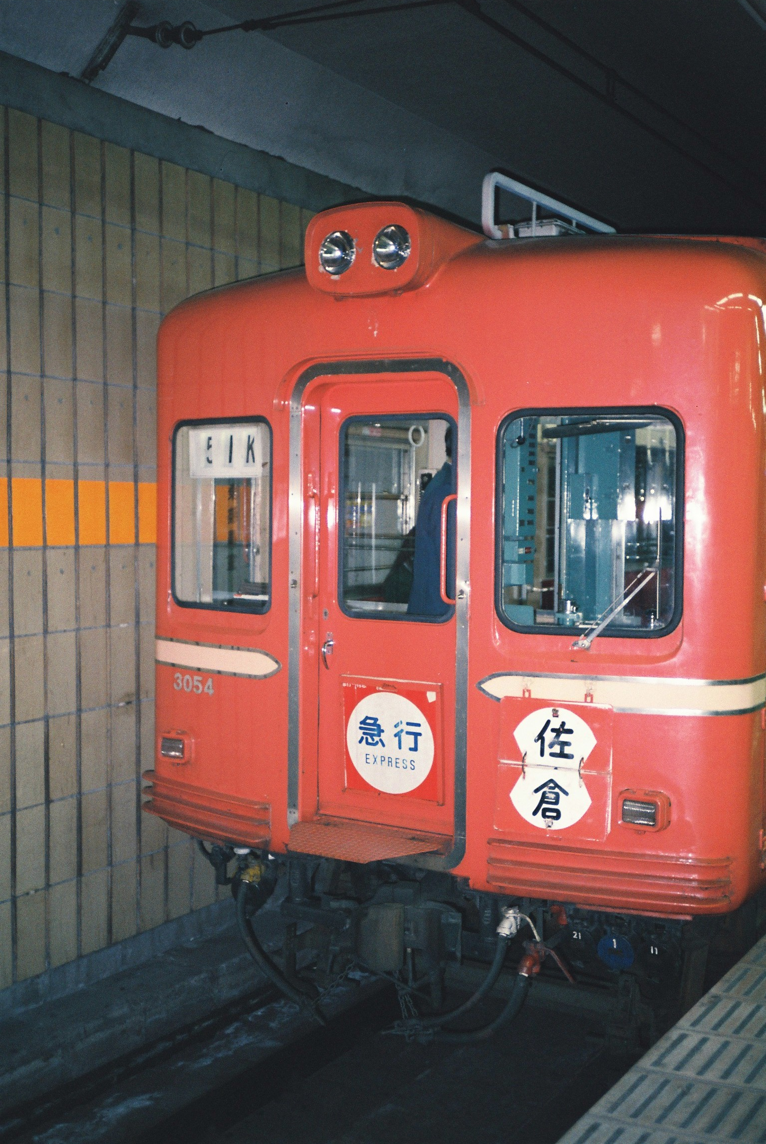 京成初代3000形3054号（押上駅にて、1987年2月撮影）